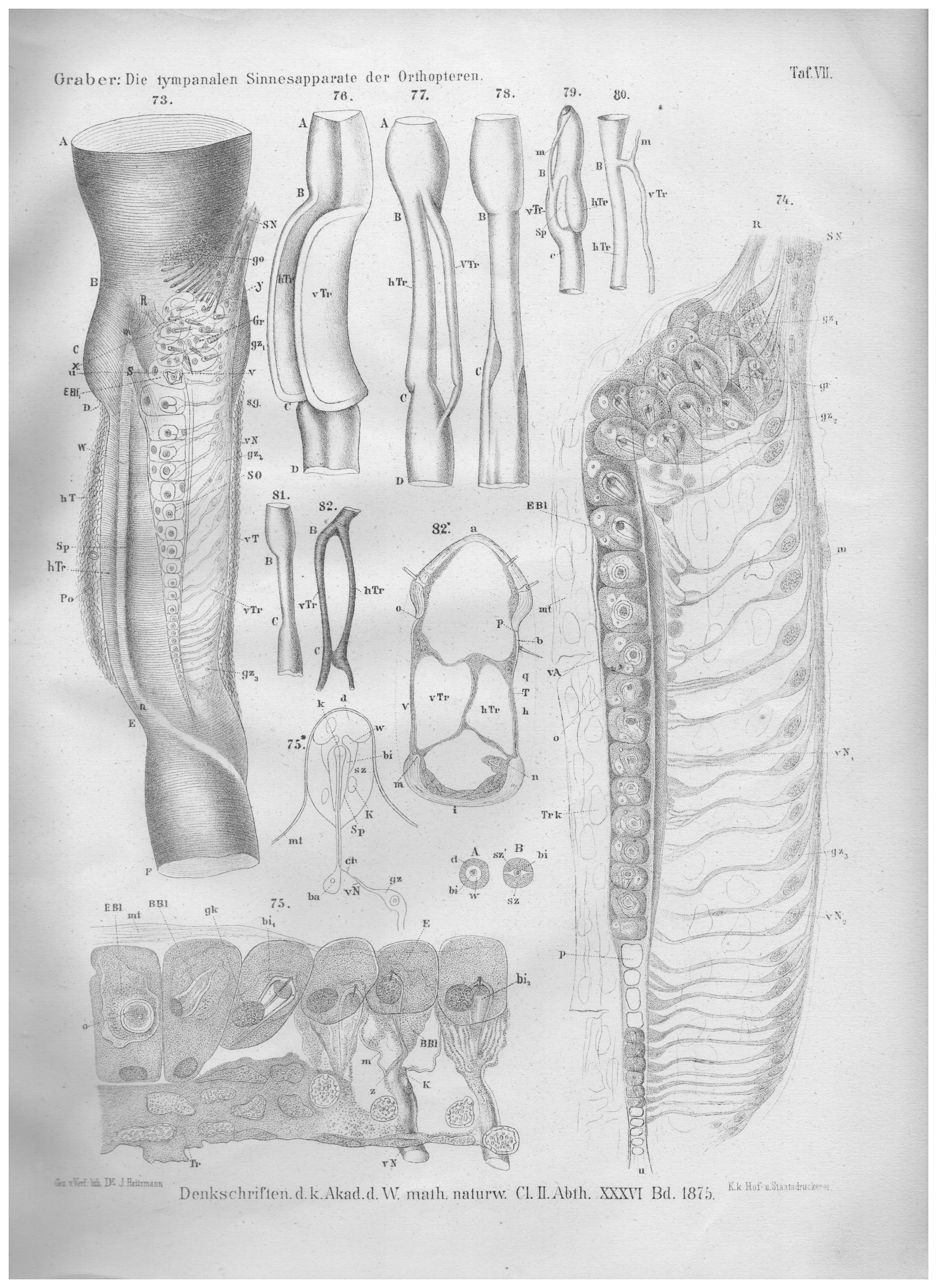 Vitus Graber: Die tympanalen Sinnesapparate der Orthopteren. Wien 1875. Tafel 7.